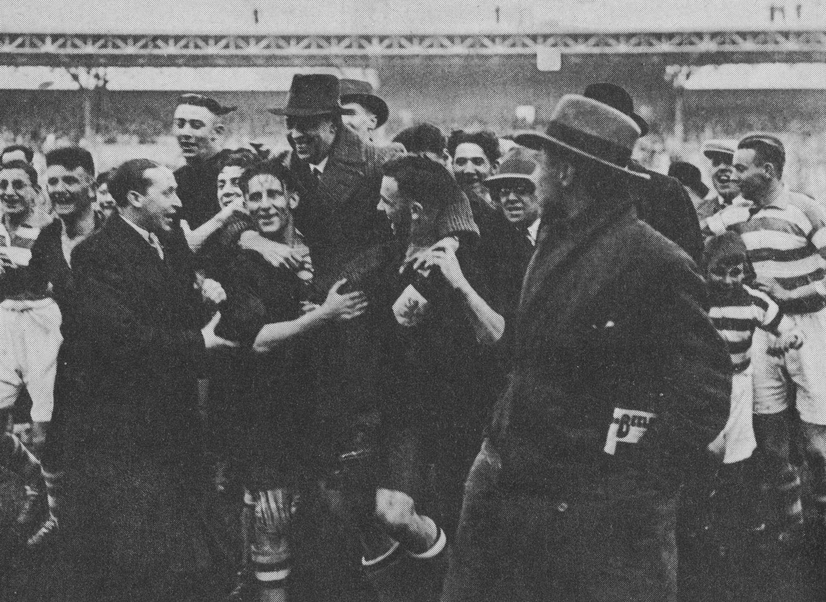 Het Nederlands elftal op 8 april 1934 voor de wedstrijd Nederland - Ierse Vrijstaat te Amsterdam. Fotograaf onbekend, afbeelding +70 jaar oud. Uit "75 jaar KNVB".